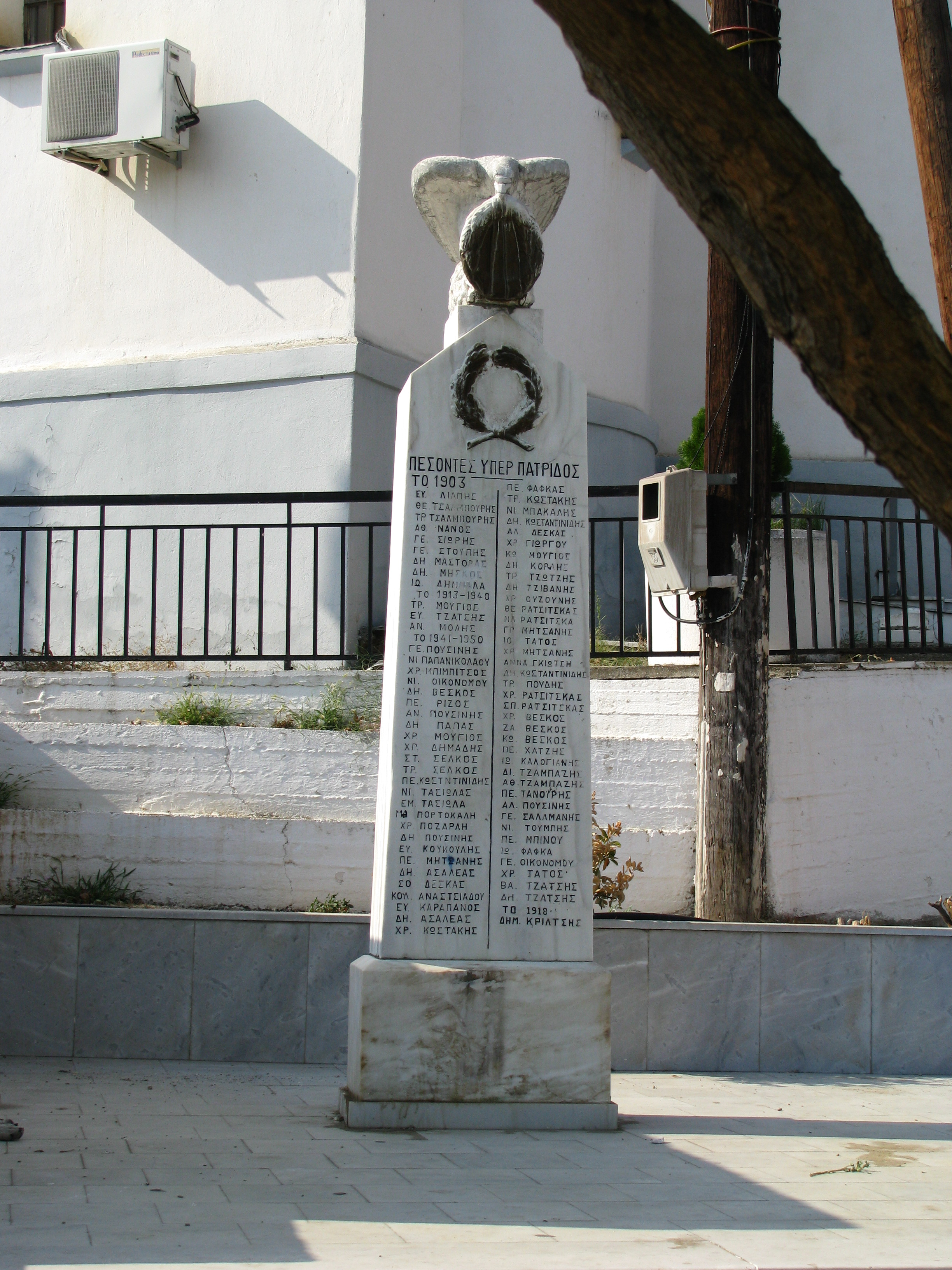 пеметника не е от Княжево. Това е гръцки паметник !!!!. България над всичко !!!